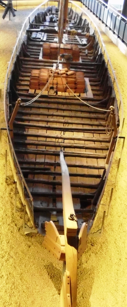 Kaffenkahn im Deutschen Technikmuseum Berlin. German Museum of Technology Native nameDeutsches Technikmuseum BerlinLocationBerlinCoordinates52° 29′ 55″ N, 13° 22′ 39″ E Established1983Website